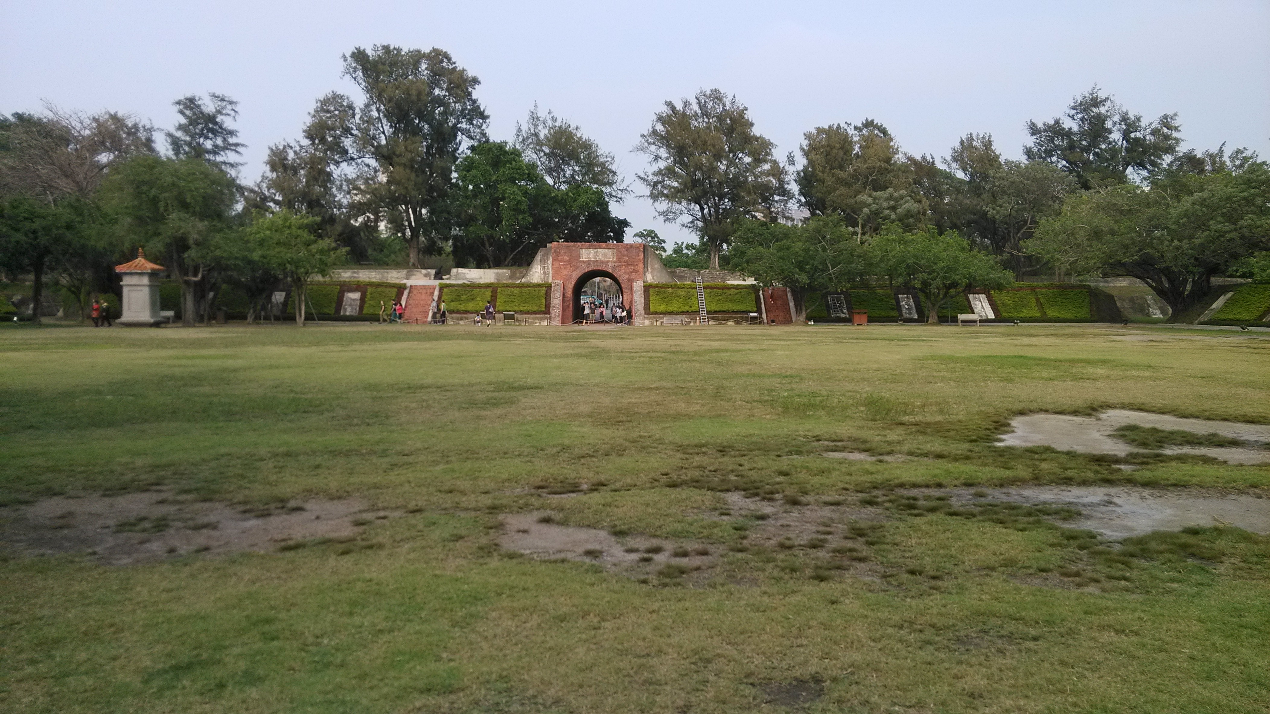 Appellplatz im Schloss